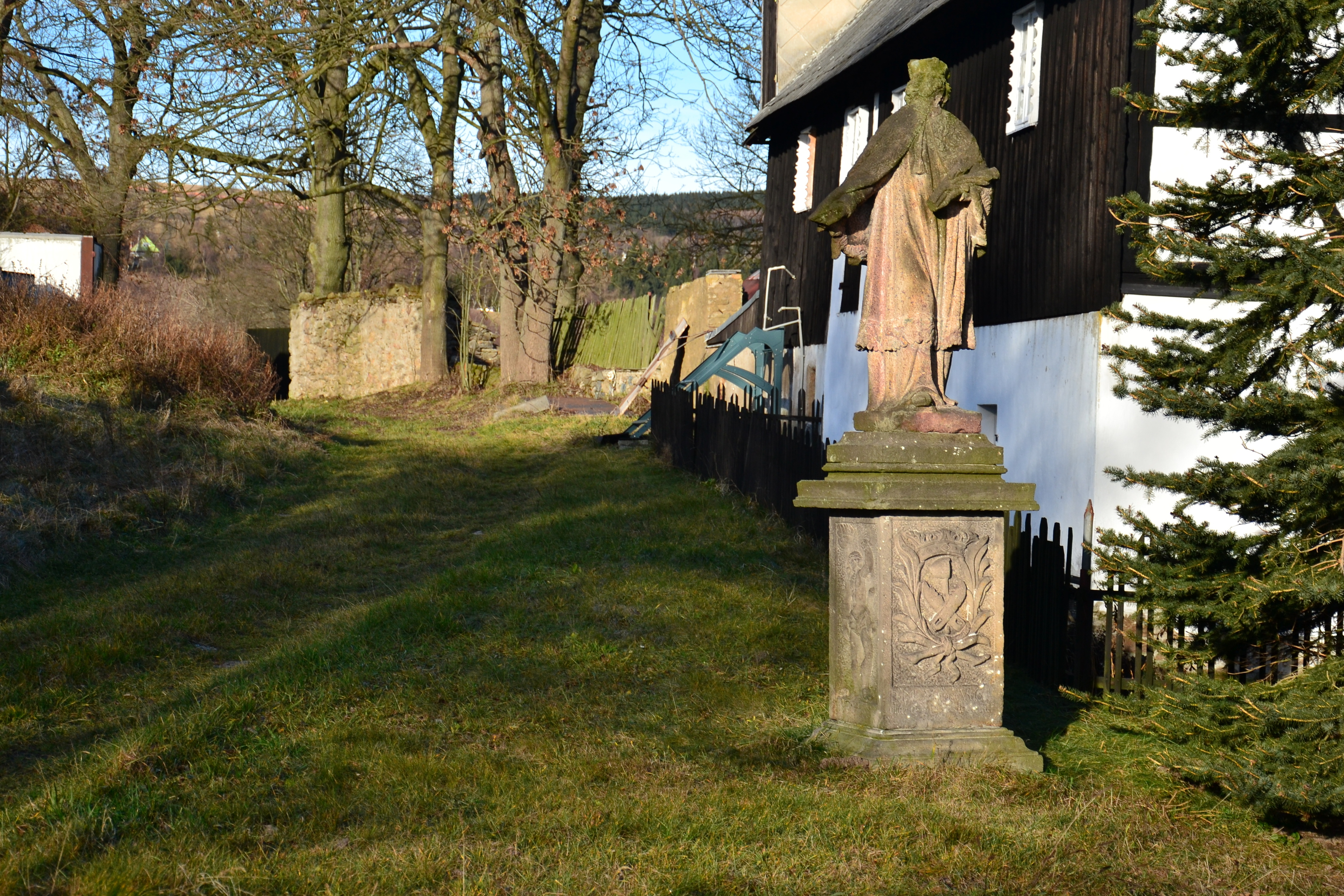 Radenov – socha u památkově chráněné usedlosti čp. 4